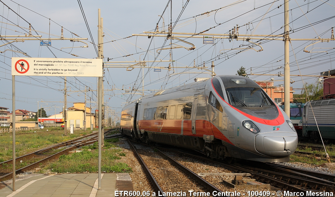 ES Lamezia - Roma in sostituzione dell' ES Reggio - Roma per la chiusura della linea nuova tra Eccellente e Rosarno